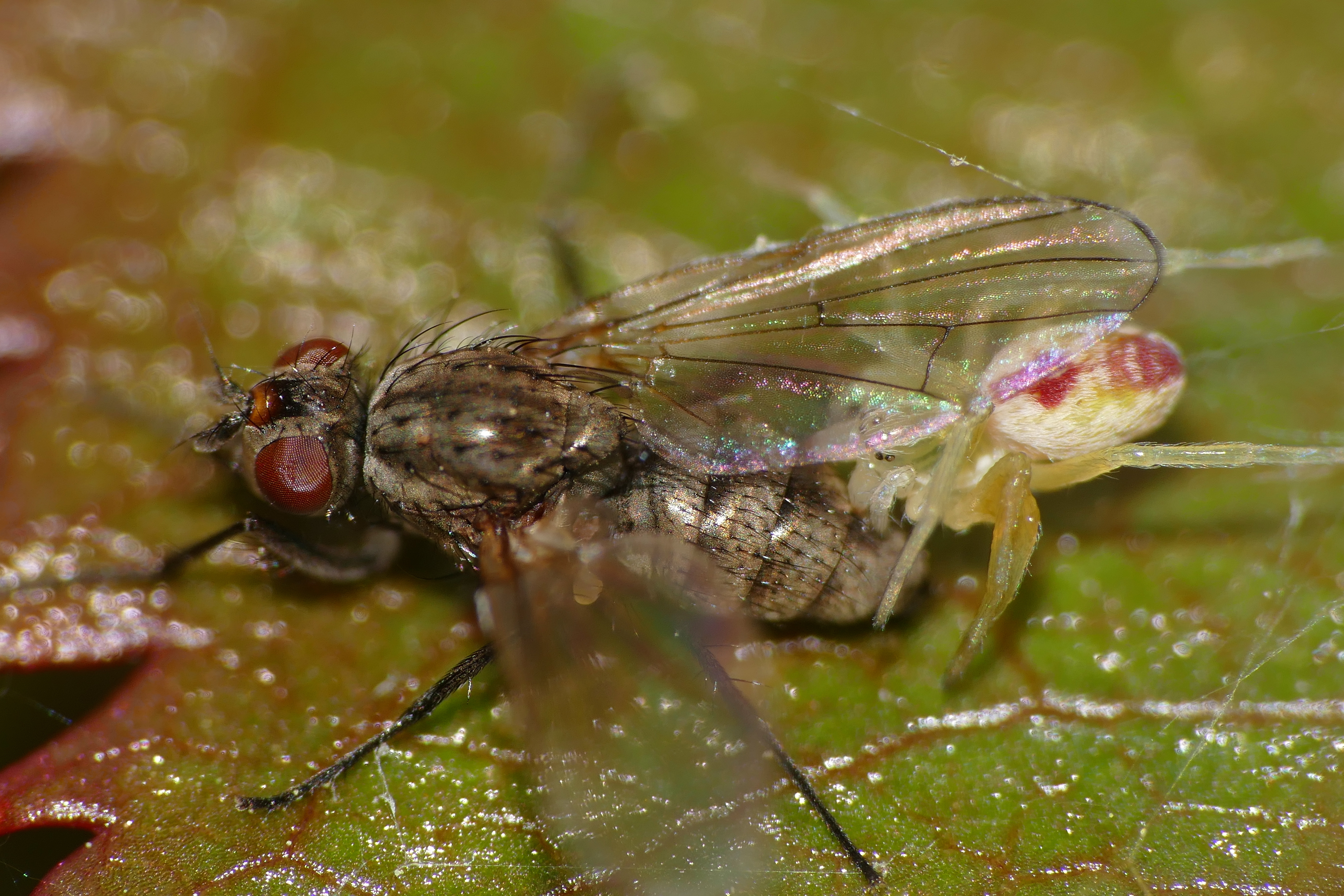 Urou-et-Crennes, Orne, FRANCE